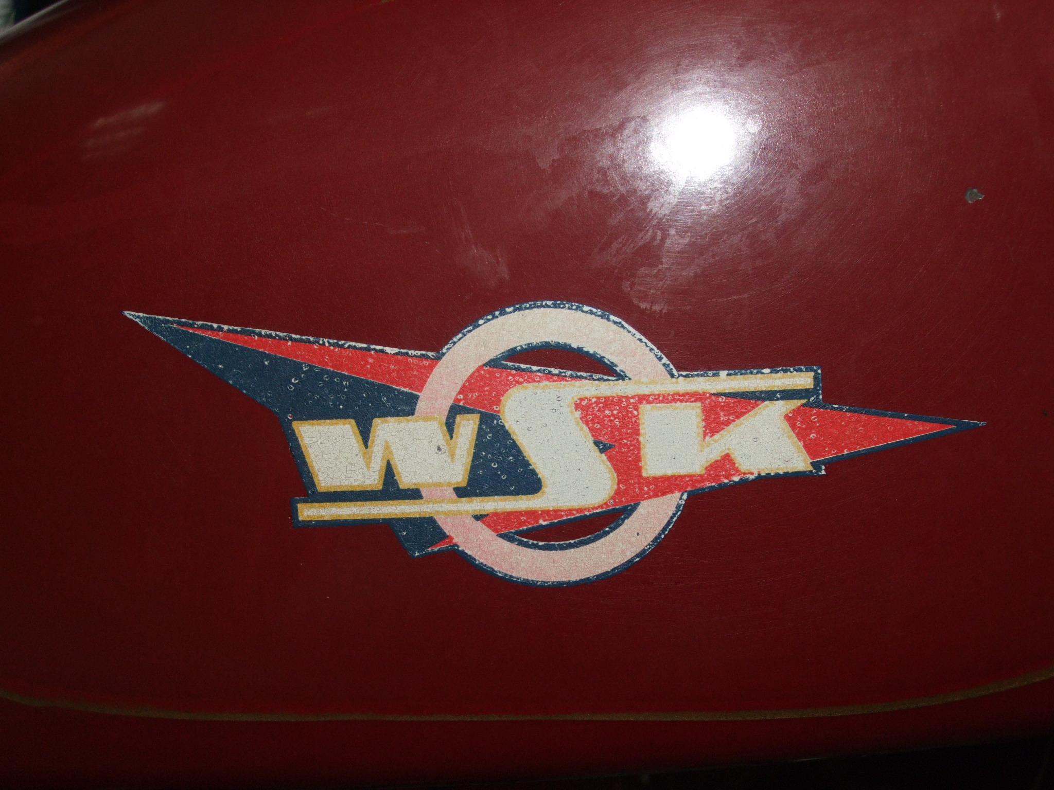 Logo marki na zbiorniku paliwa motocykla WSK.